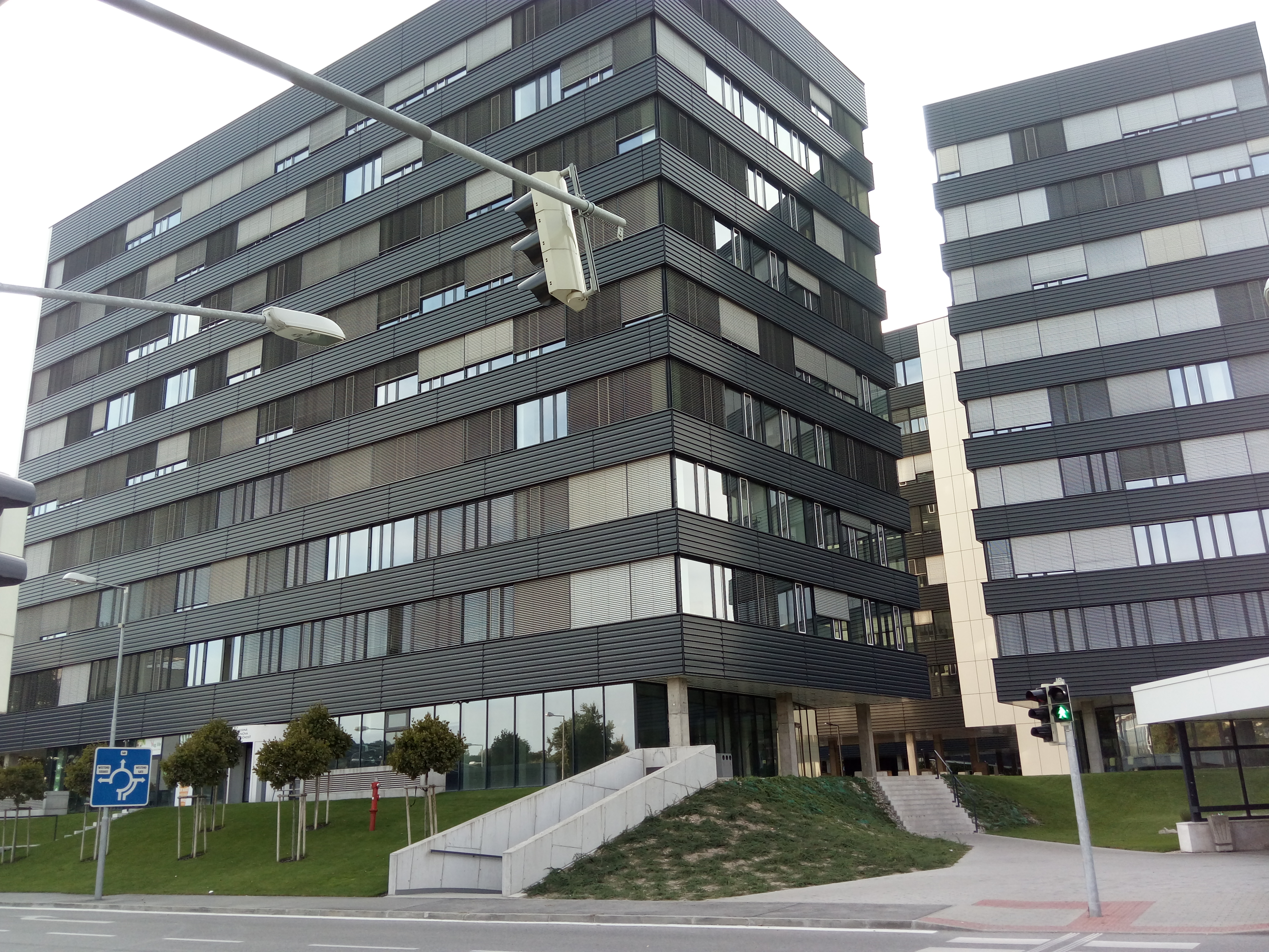 Patrónka, Bratislava